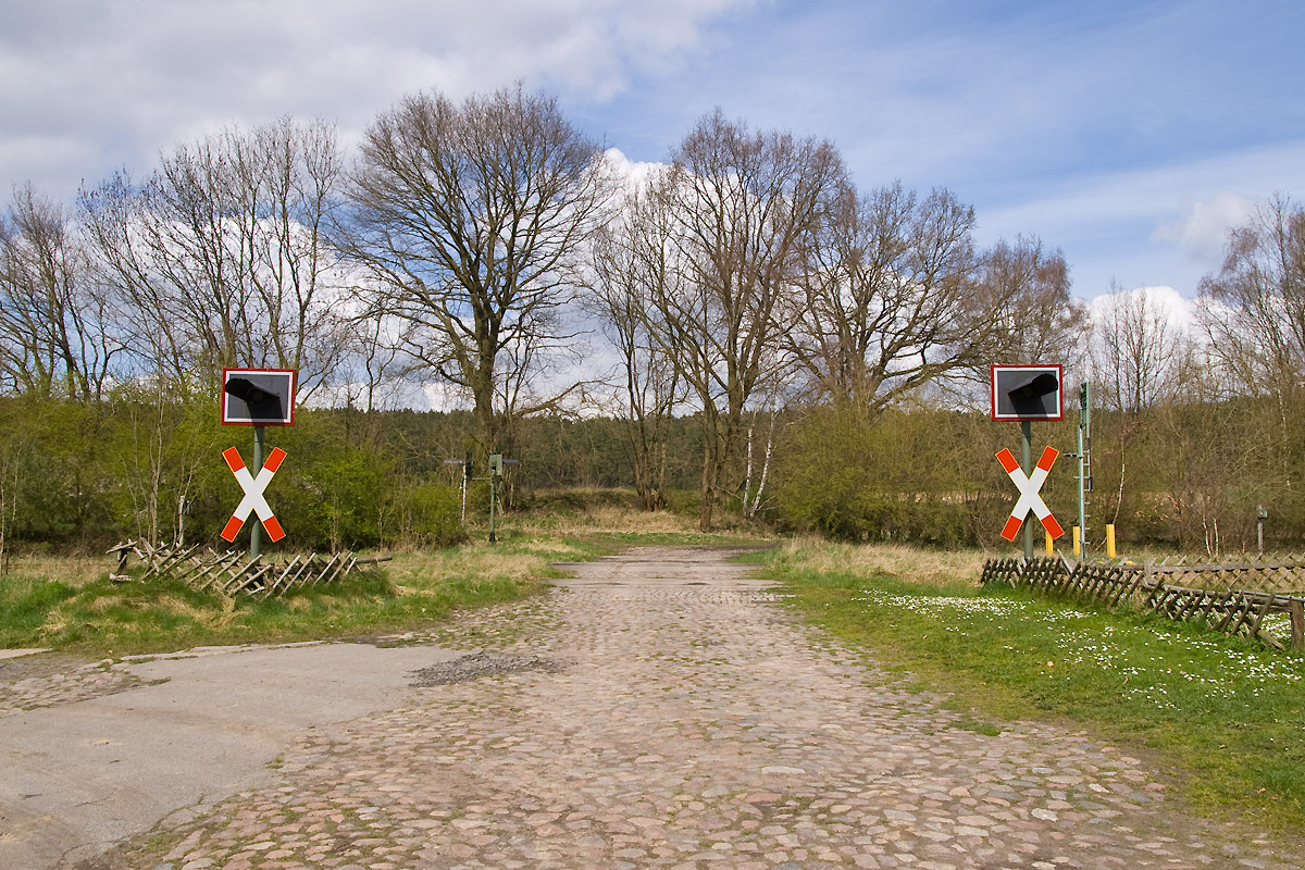 Haltepunkt Göhrde. Bahnübergang am westlichen Ende zur ehemaligen Ladestraße.